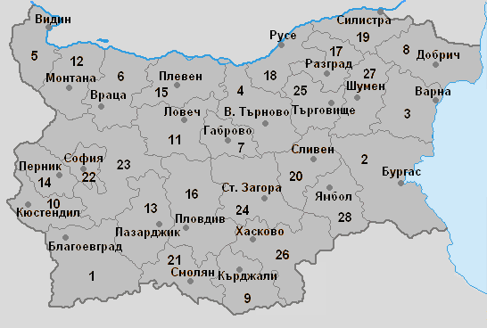 Области в България